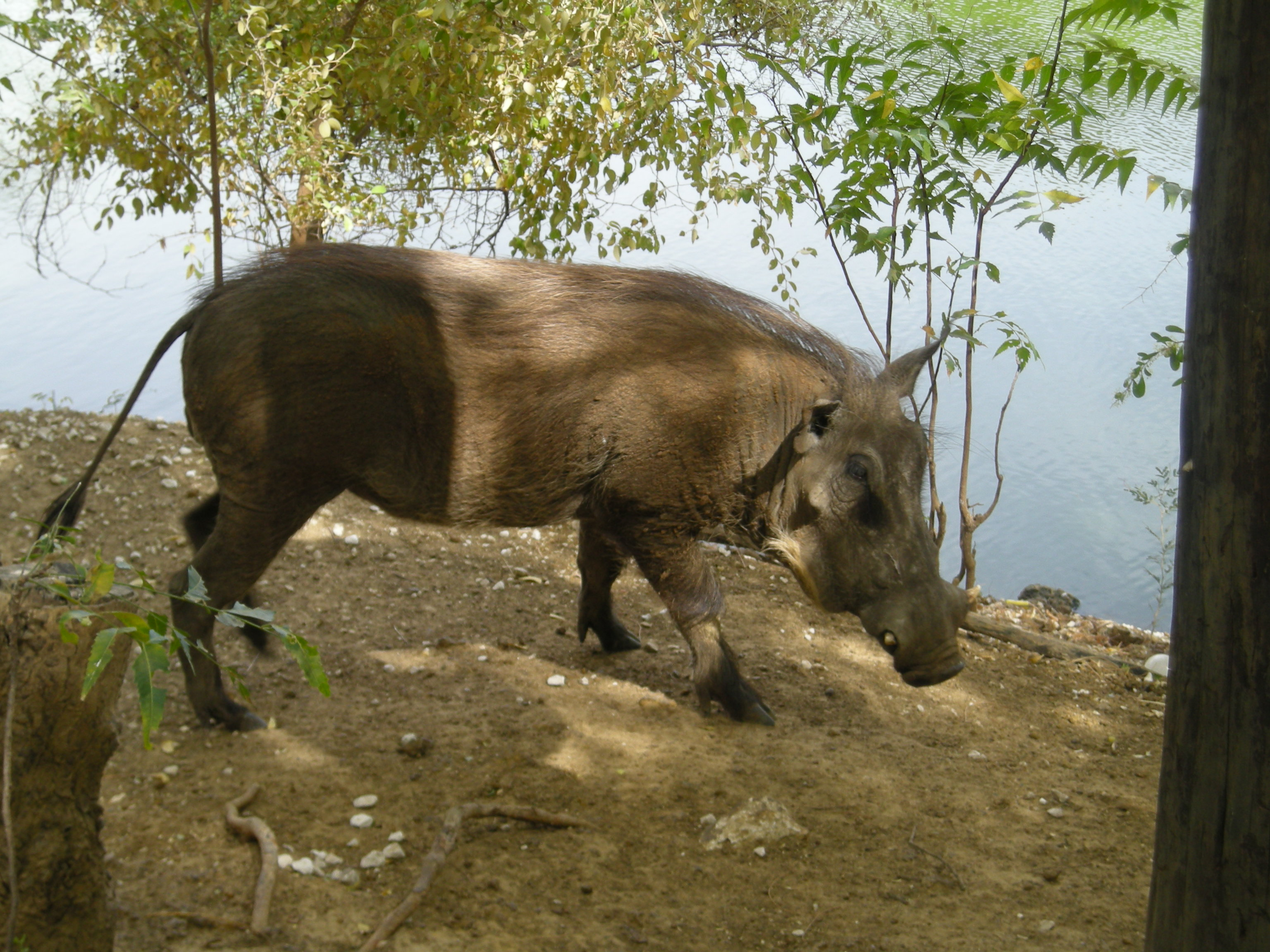 Phacochère à la Réserve de Bandia (Sénégal)